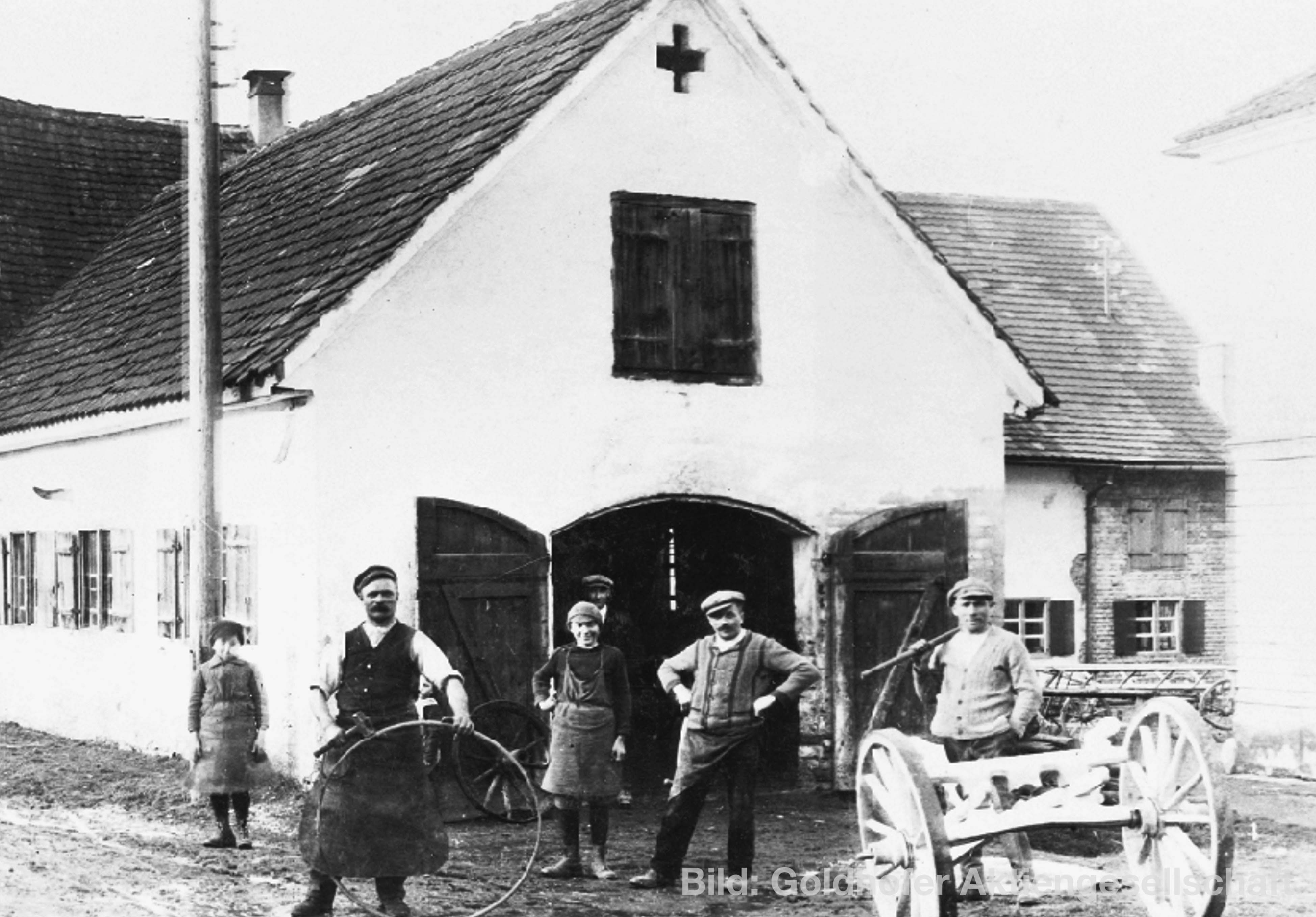 Die Familienschmiede der Firma Goldhofer in Amendingen (ca. 1930)